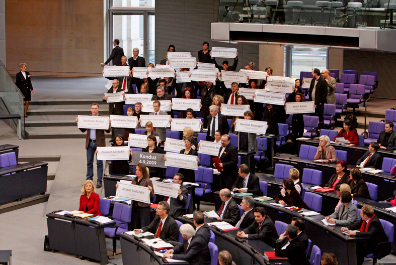 Originalbeschreibung: Lammert wirft DIE LINKE wegen stillen Gedenkens für die Kundus-Opfer raus DIE LINKE hat geschlossen gegen die Verlängerung des Kriegseinsatzes und gegen die Truppenaufstockung gestimmt, die heute mit der Mehrheit von Union, SPD und FDP beschlossen wurde - bei 429 Ja-, 111 Nein-Stimmen und 46 Enthaltungen. Am Ende der Rede von Christine Buchholz haben die Mitglieder der Fraktion DIE LINKE still der Opfer des NATO-Bombardements bei Kundus am 4. September 2009 gedacht. Buchholz unterstreicht in ihrer Rede: Ohne die Unterstützung der NATO-Soldaten wäre die Karsai-Regierung nichts. Militärische Aufstandsbekämpfung und Schutz der Bevölkerung sind unvereinbar. Die Bombardierung der Tanklaster wird nicht die letzte dieser Art bleiben, wenn Sie heute die Verlängerung des Mandats beschließen. Deutschland ist an einem Krieg gegen die einfache Bevölkerung in Afghanistan beteiligt.